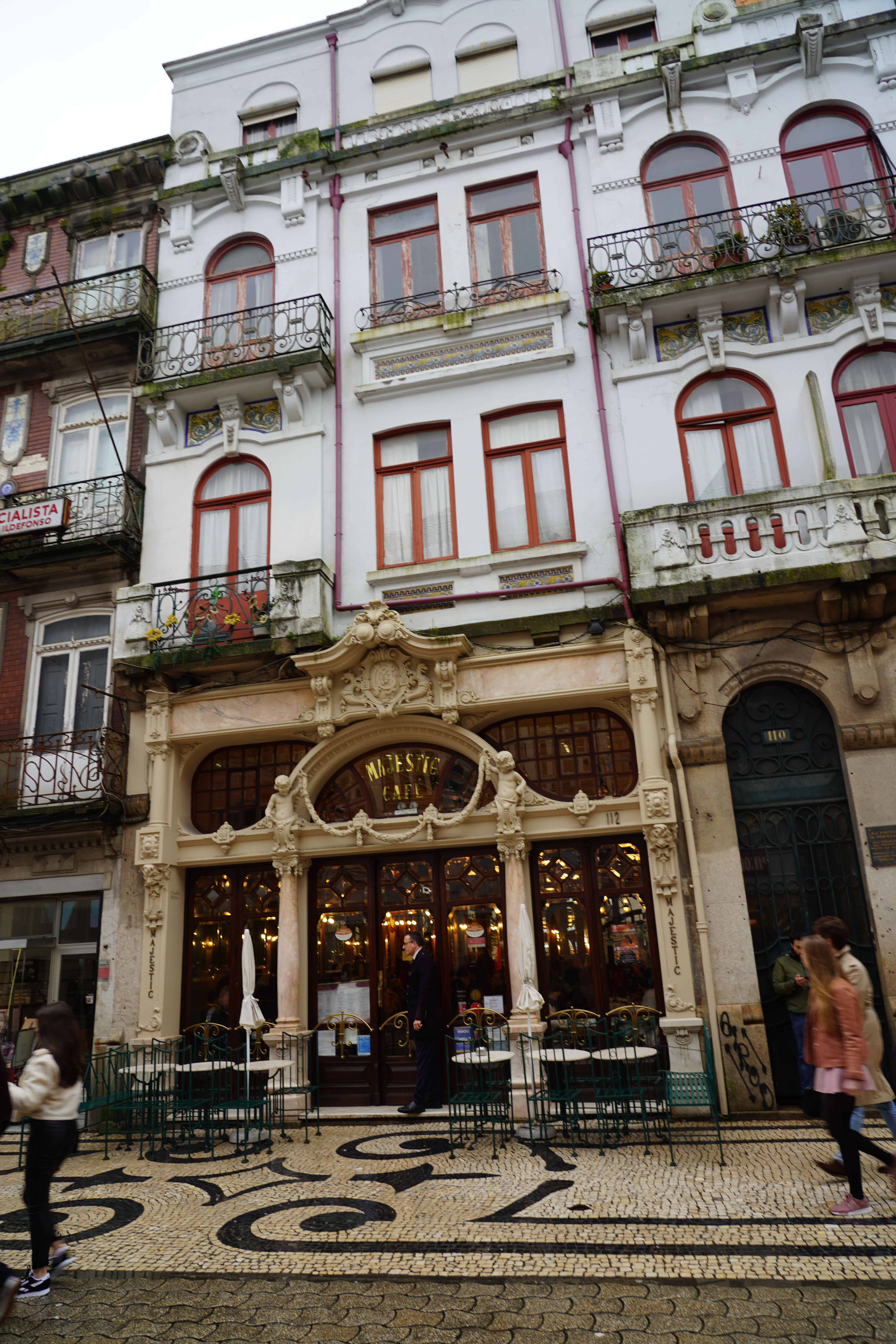 20200131_SantaCatarina_4136